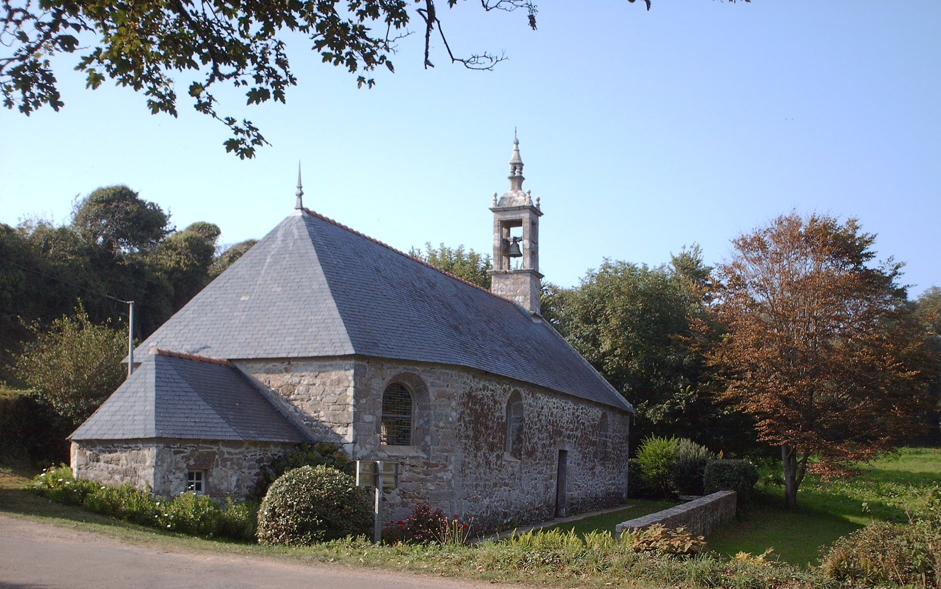 Chapelle St Tugdual à Cléden-Cap-Sizun (29) .